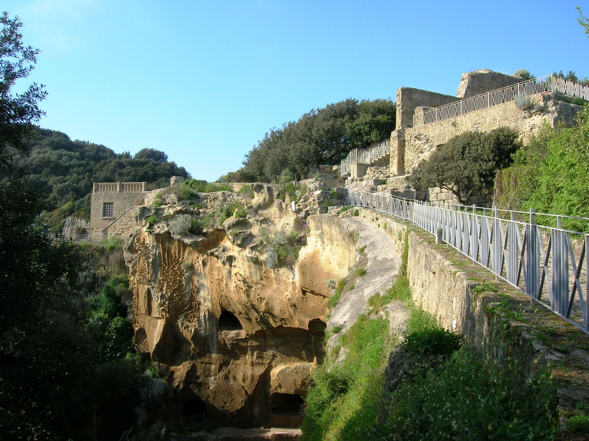 Acropoli